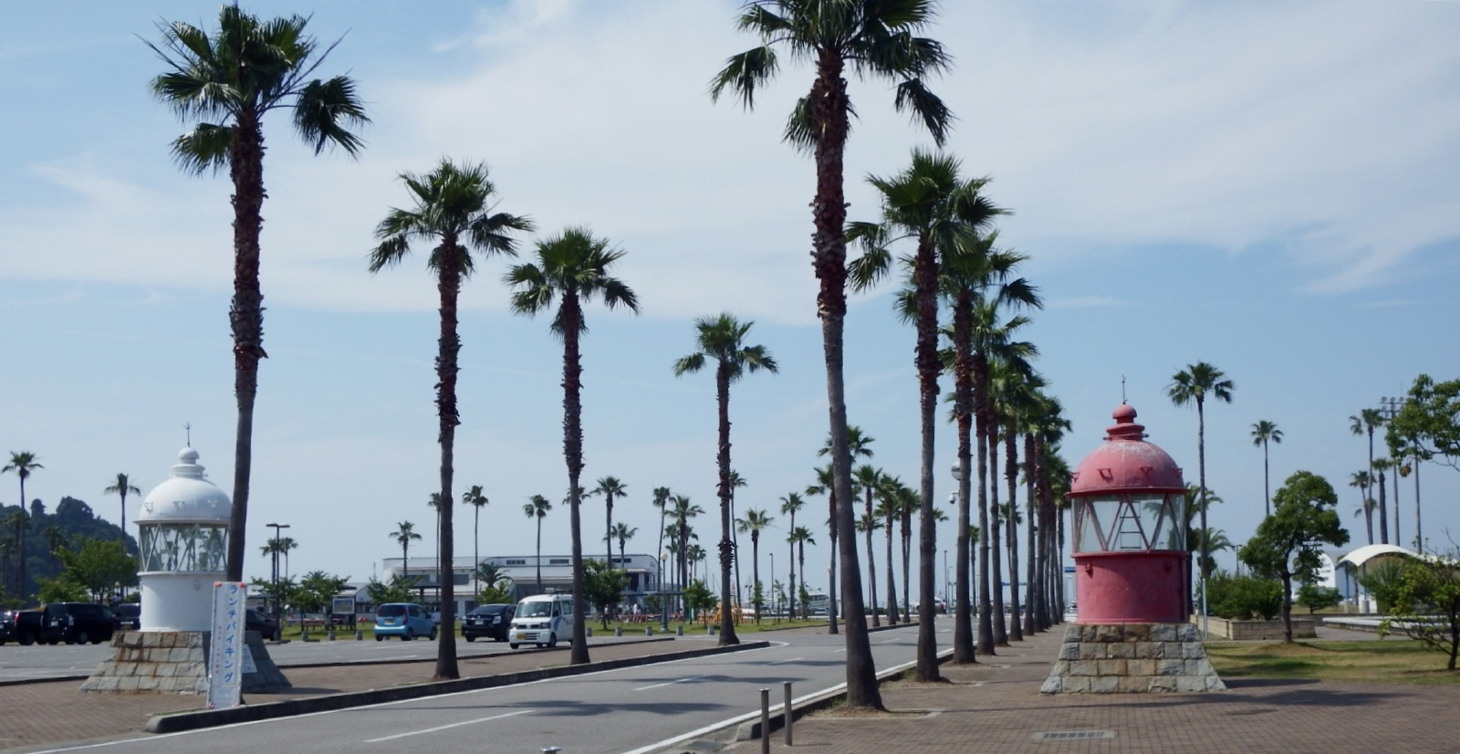 マリンパーク新居浜を入口付近から